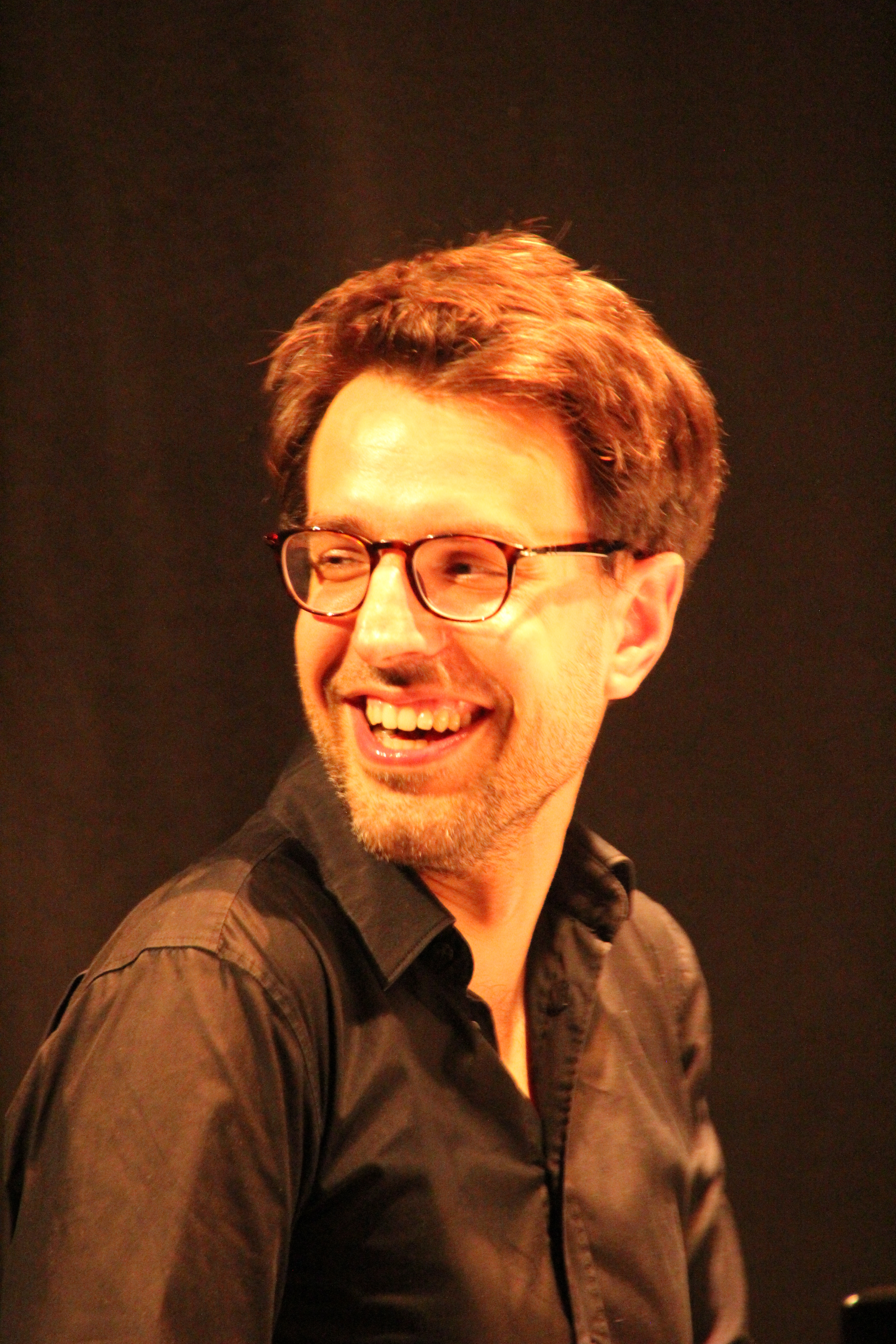 Bildinhalt: Sebastian Sternal bei einem Konzert mit Daniel Guggenheim in der Frankfurter Romanfabrik Aufnahmeort: Frankfurt am Main, Deutschland Die dargestellte Person wurde bei einem öffentlichen Auftritt fotografiert.